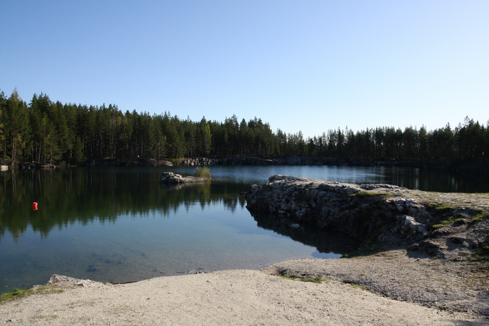 Kaatialan avolouhos etelärannalta kuvattuna.